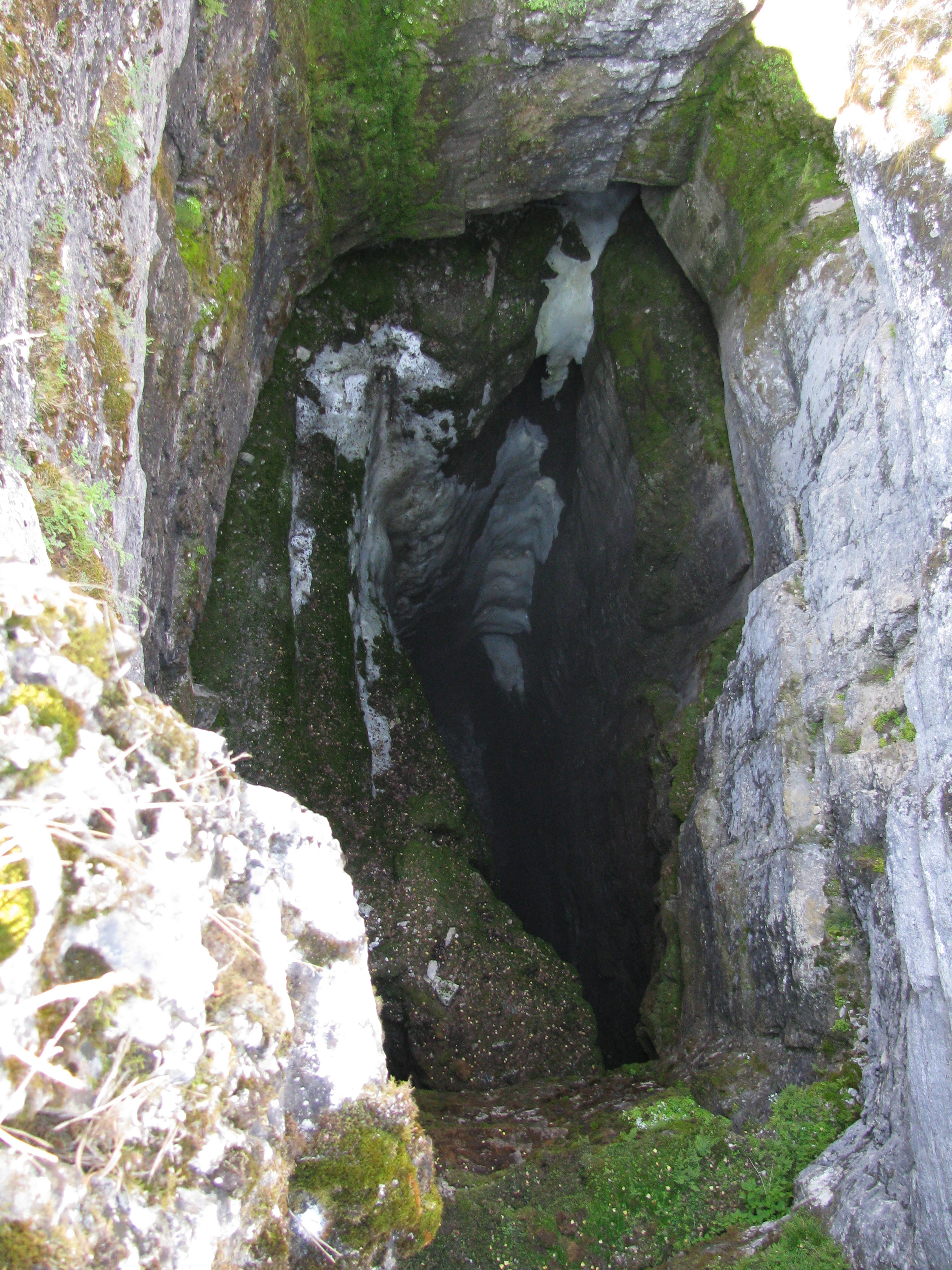 Входная шахта пещеры Сумган-Кутук